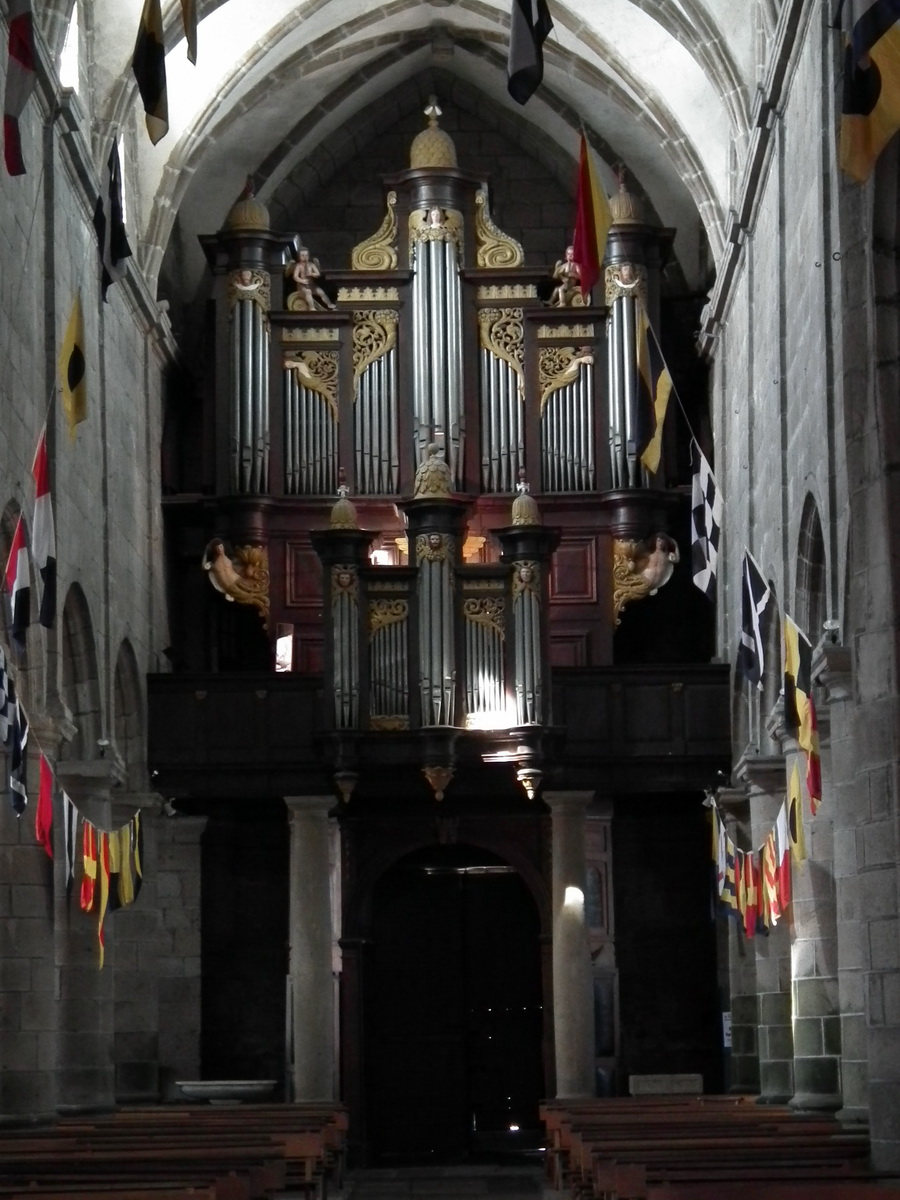 Église Notre-Dame-du-Cap-Lihou, Granville, France